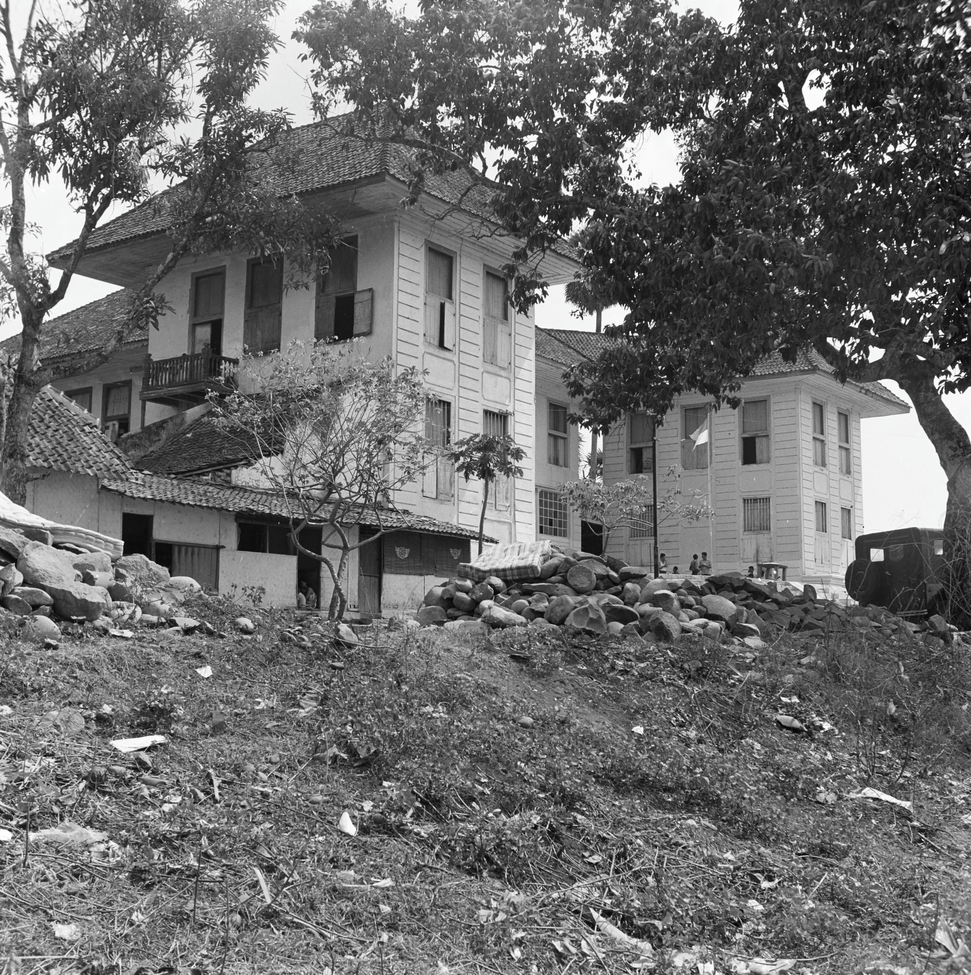 Landhuis Groeneveld, oorspronkelijke achterzijde Onderwerp: Landhuizen